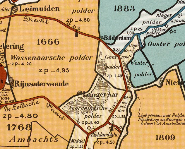 Noordeindse polder